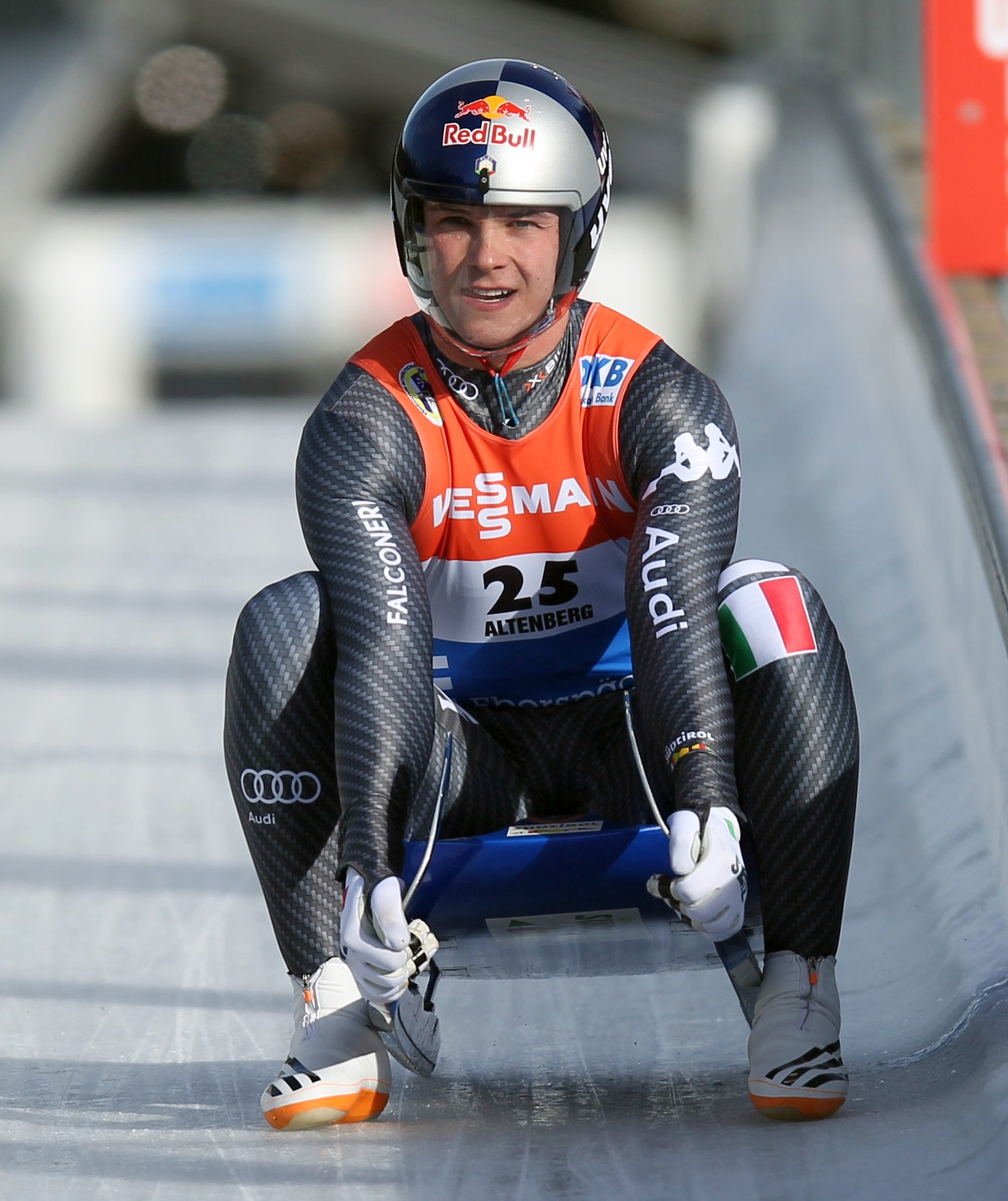 Dominik Fischnaller beim Rennrodel-Weltcup der Herren in Altenberg 2017